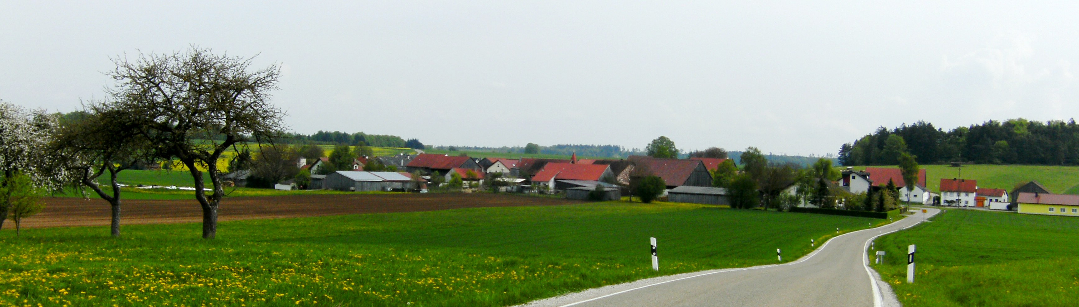 Oberemmendorf, Gemeindeteil von Kipfenberg im Landkreis Eichstätt in Bayern